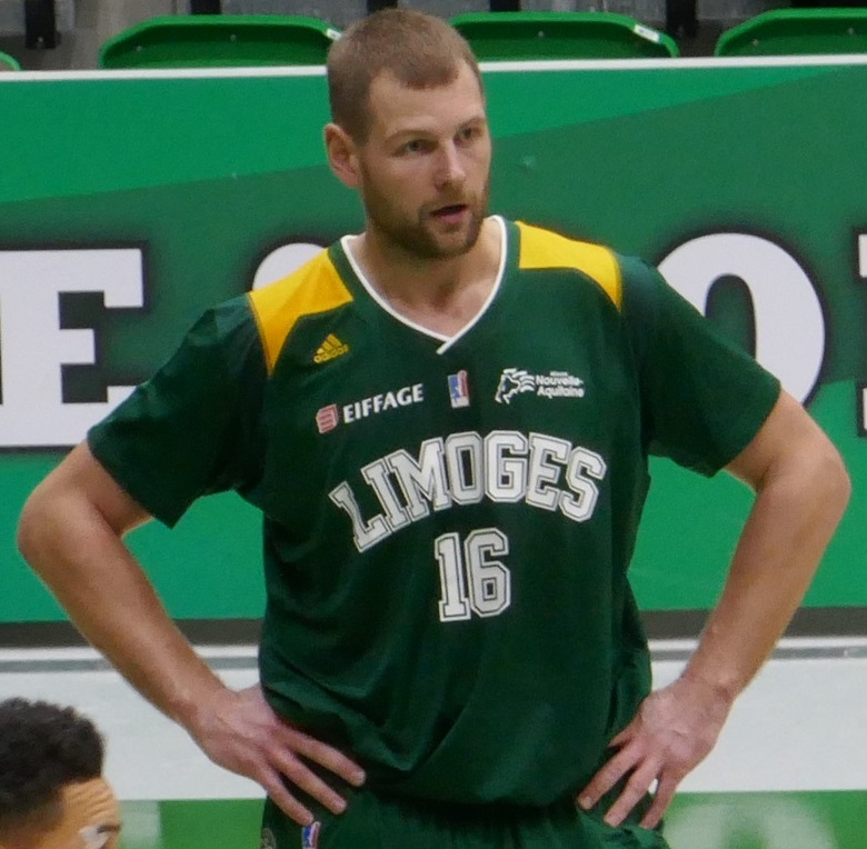 Tautvydas Lydeka